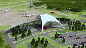 Новый аэровокзальный комплекс аэропорта Белгород